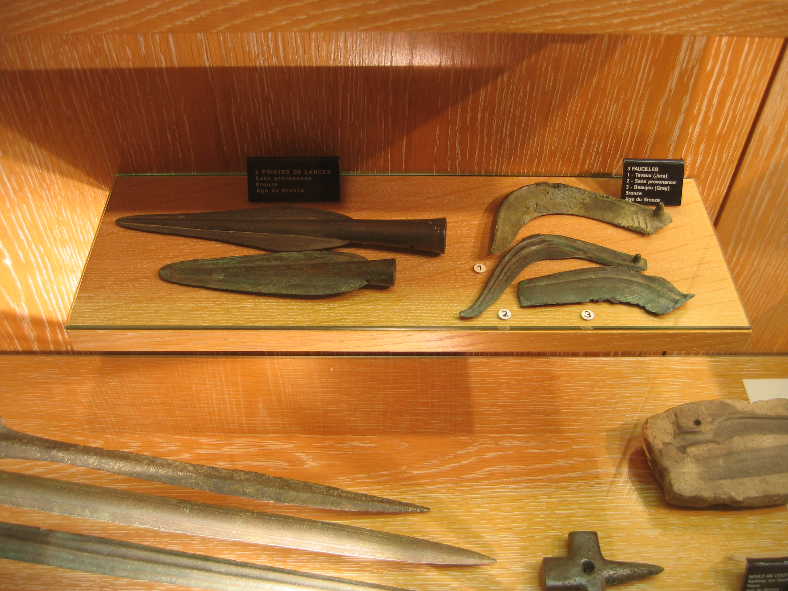 Pointes de lances faucilles musée archéologique Dijon France